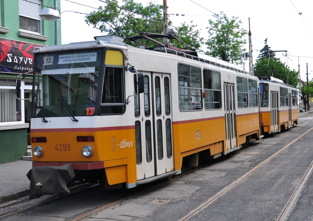 A 12-es villamos a rákospalotai végállomásán